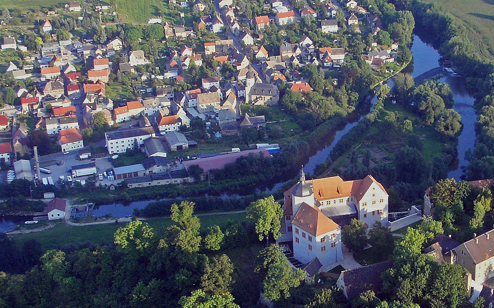 Luftbild Dorndorf an der Saale - Vordergrund altes Schloss Dornburg - Foto Wolfgang Pehlemann F0000238